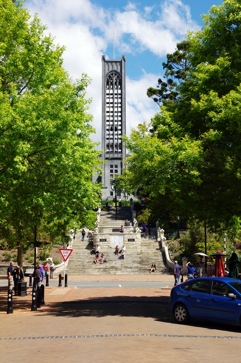 Turm Christ Church Cathedral, Nelson